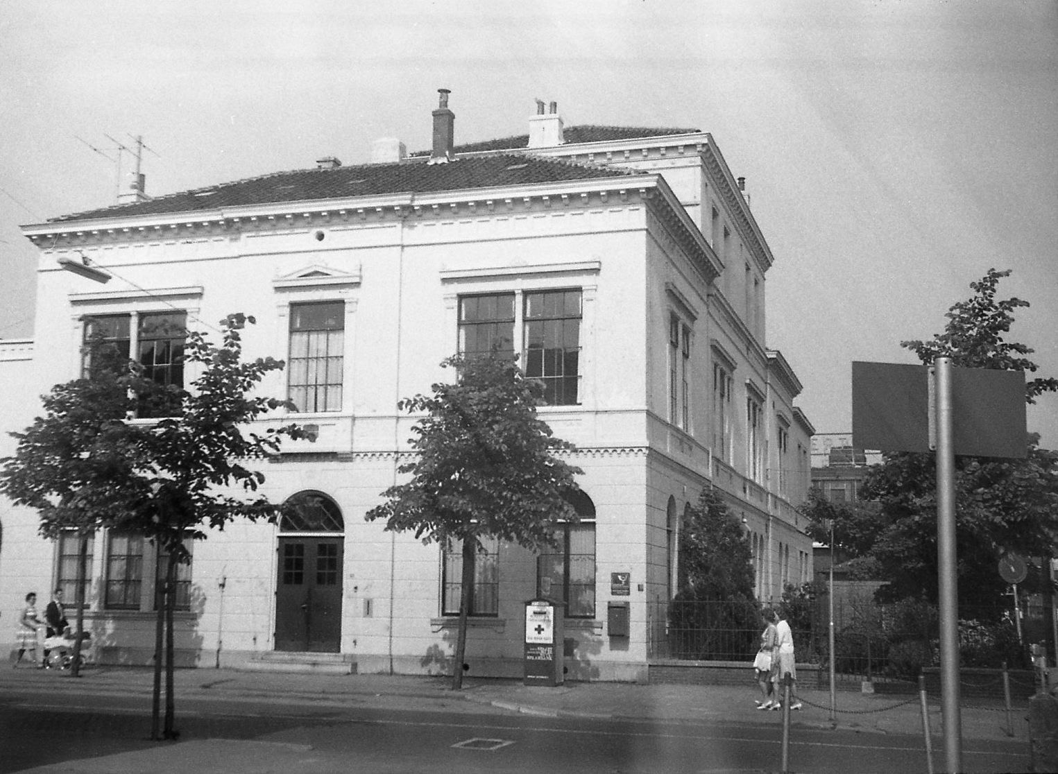 Het oude gebouw van het Zaanlands Lyceum aan de Westzijde 92 te Zaandam. Foto gemaakt ca. 1961.